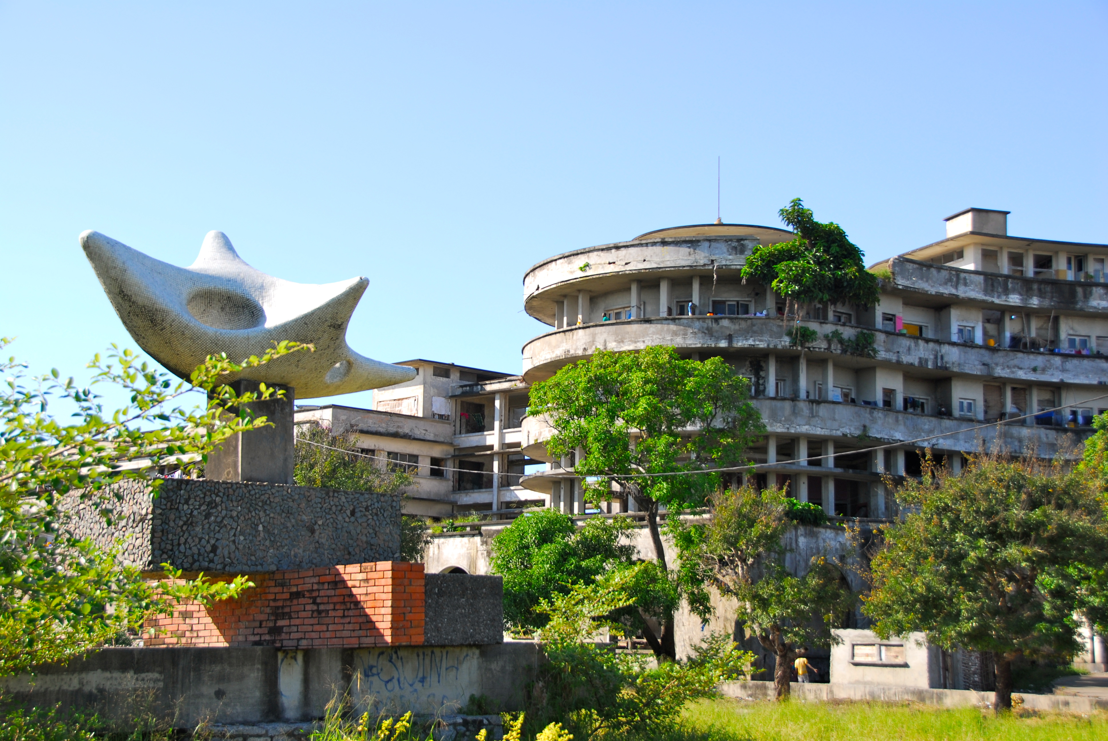 Grande Hotel, Beira, Mozambique